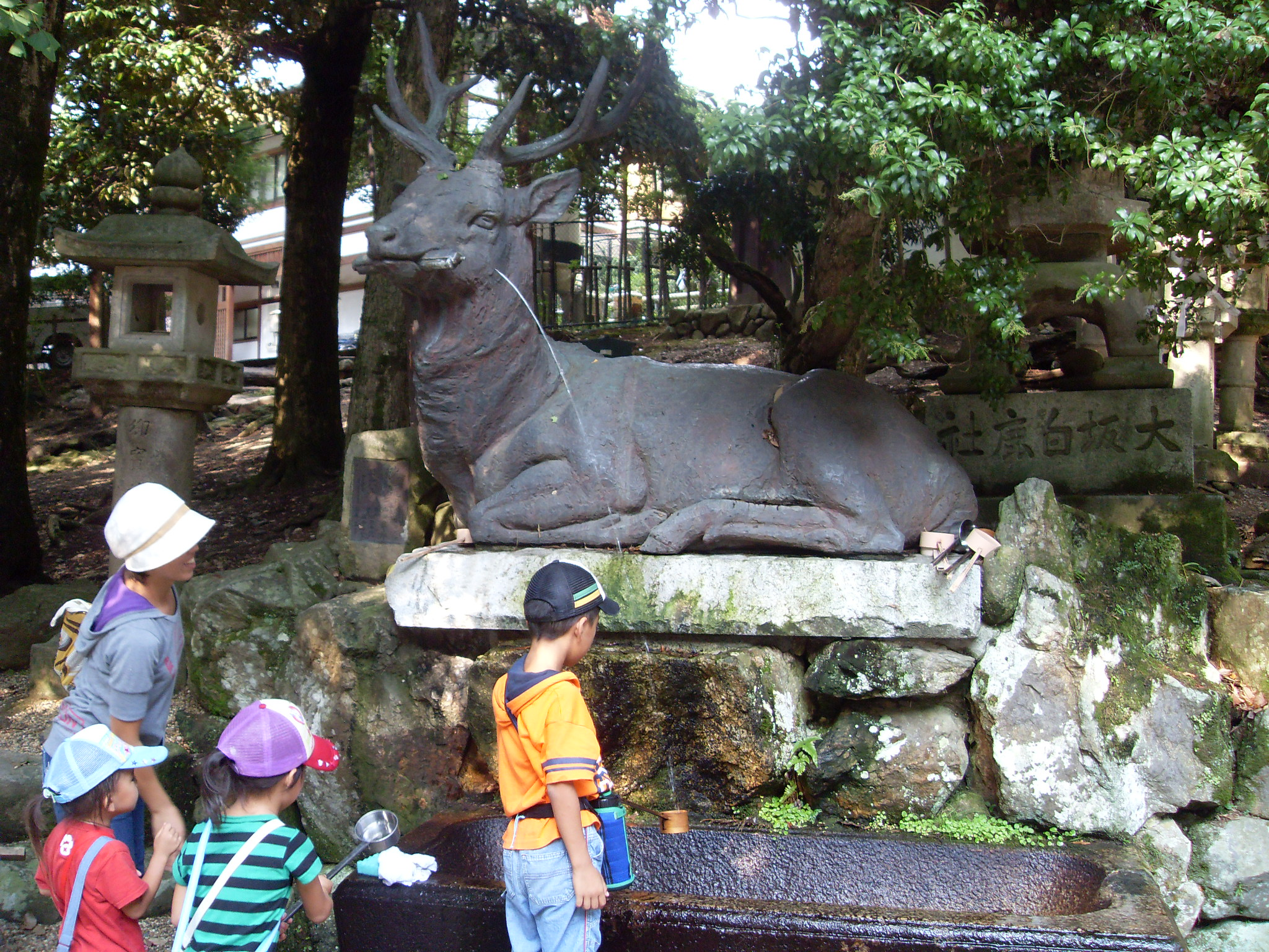 Deer chouzuya at Kasuga-taisha, Nara, Japan